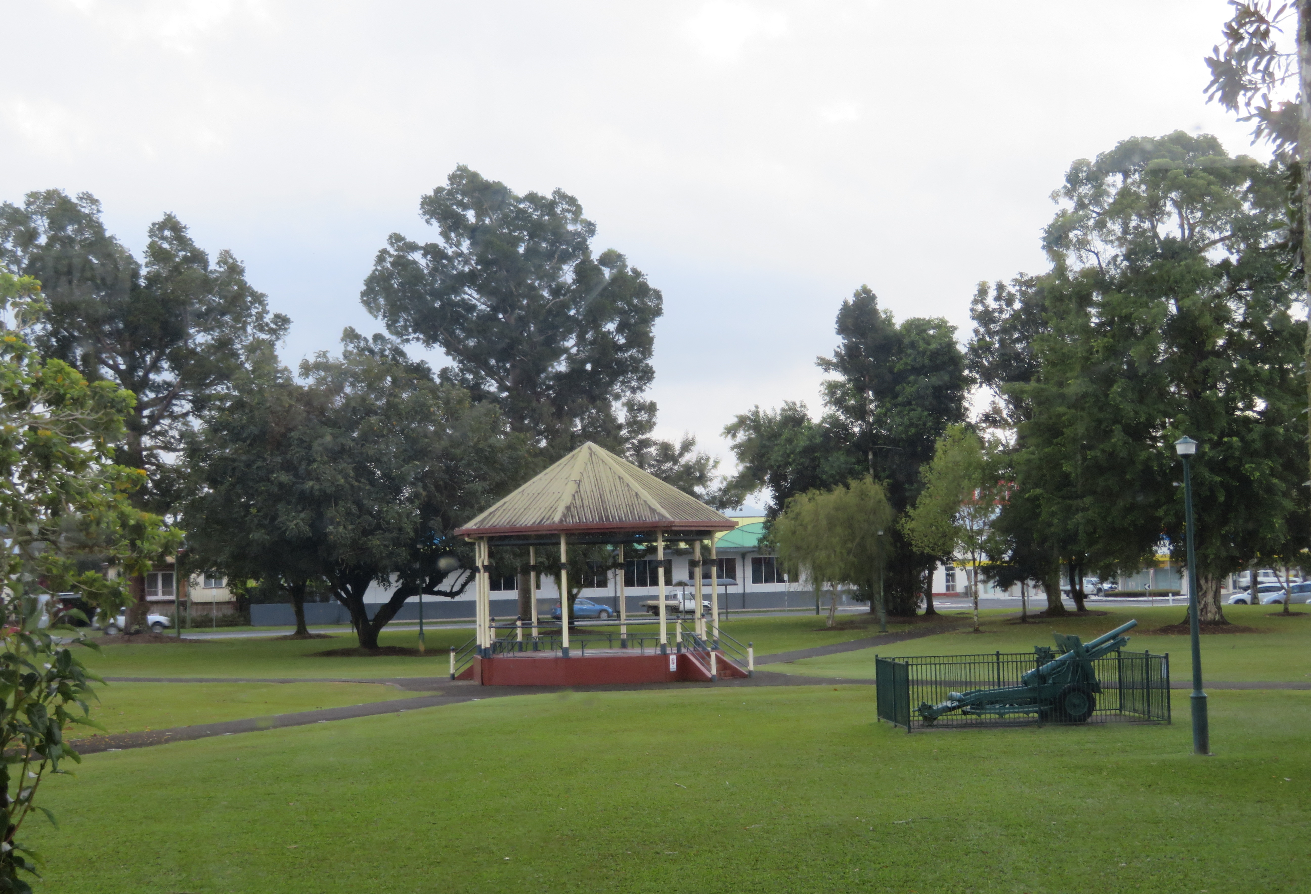 Anzac Memorial Park, Innisfail, Queensland, Australien